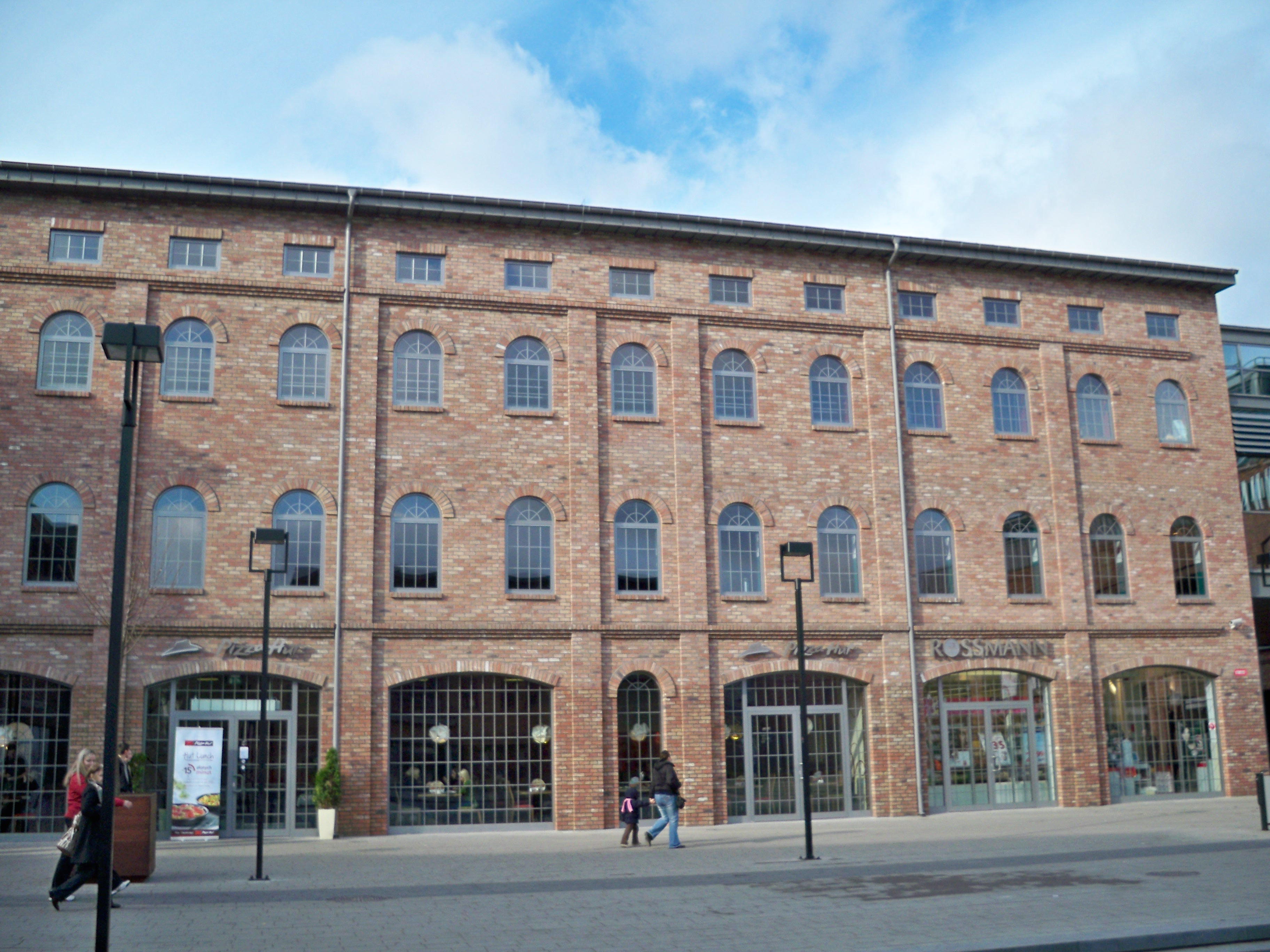 Włocławek_2009_Wzorcownia_20012020